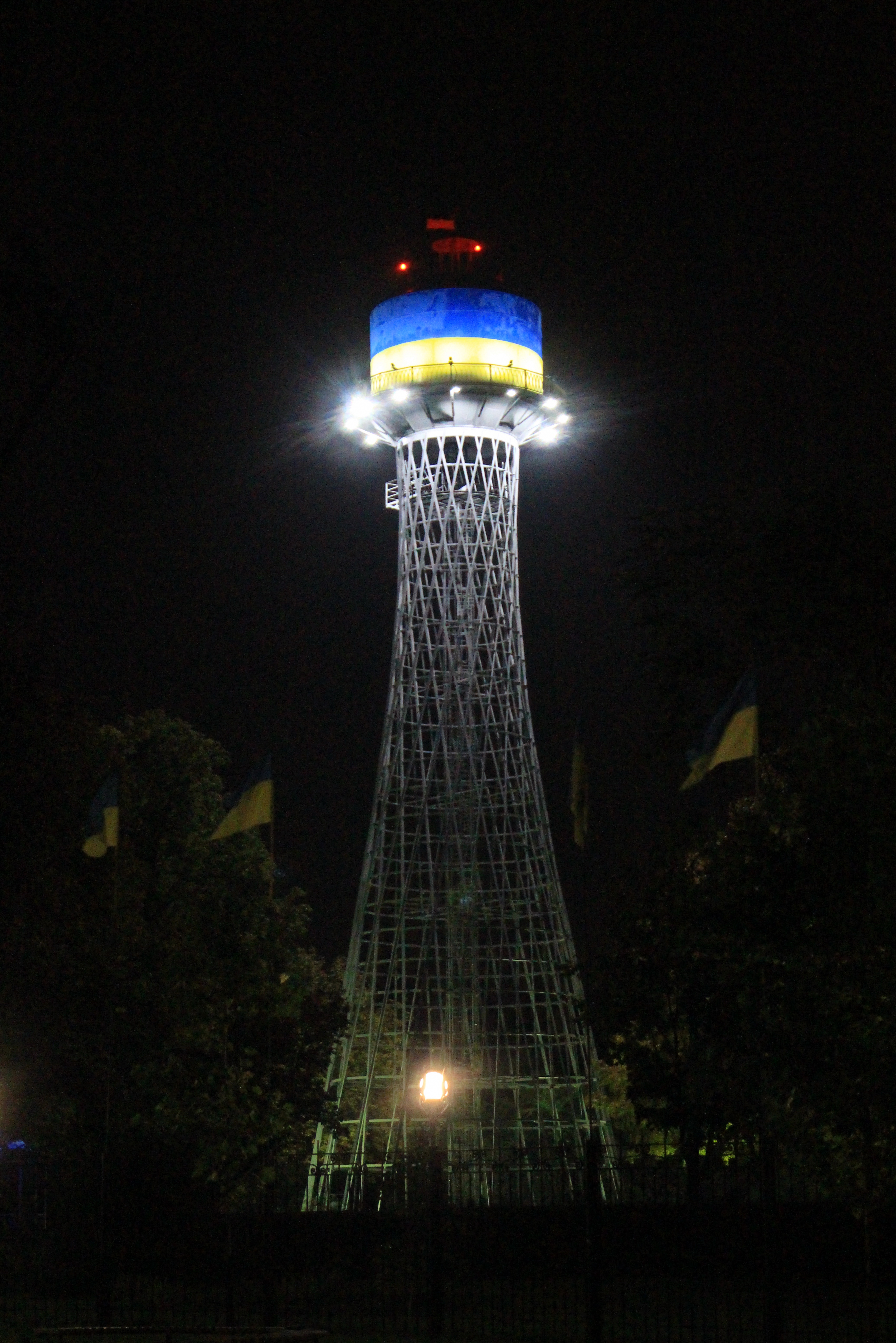 Нічне освітлення вежі